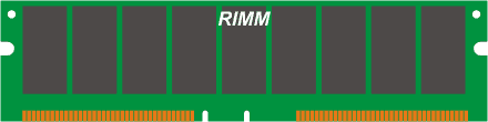 RIMM-Ram Modul M1:1